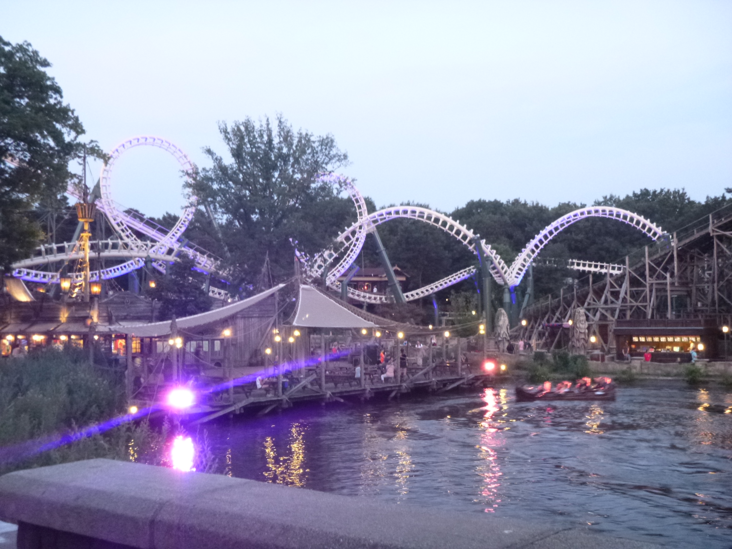 Montagnes russes en soirées Efteling